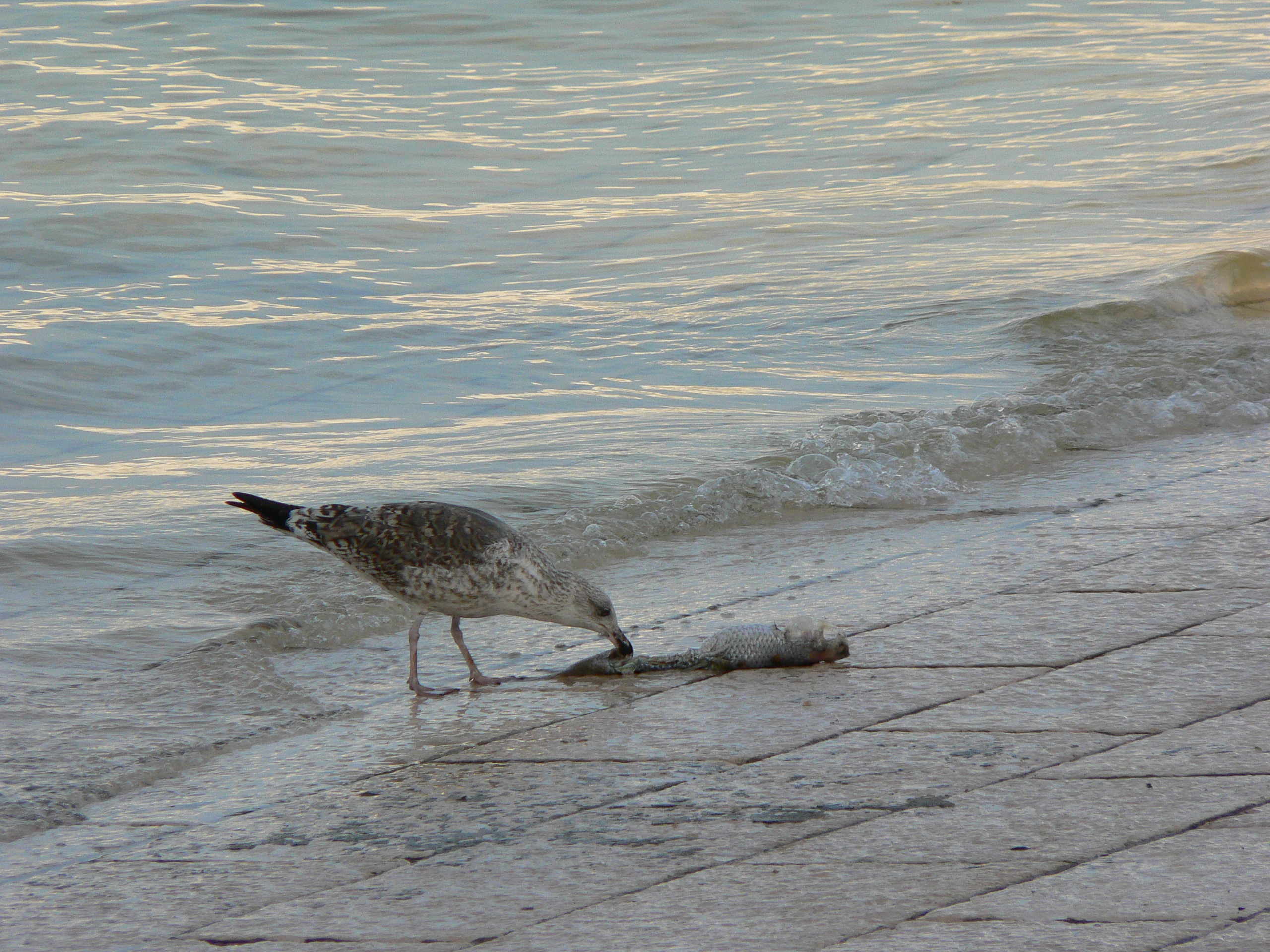 Larus fuscus immature